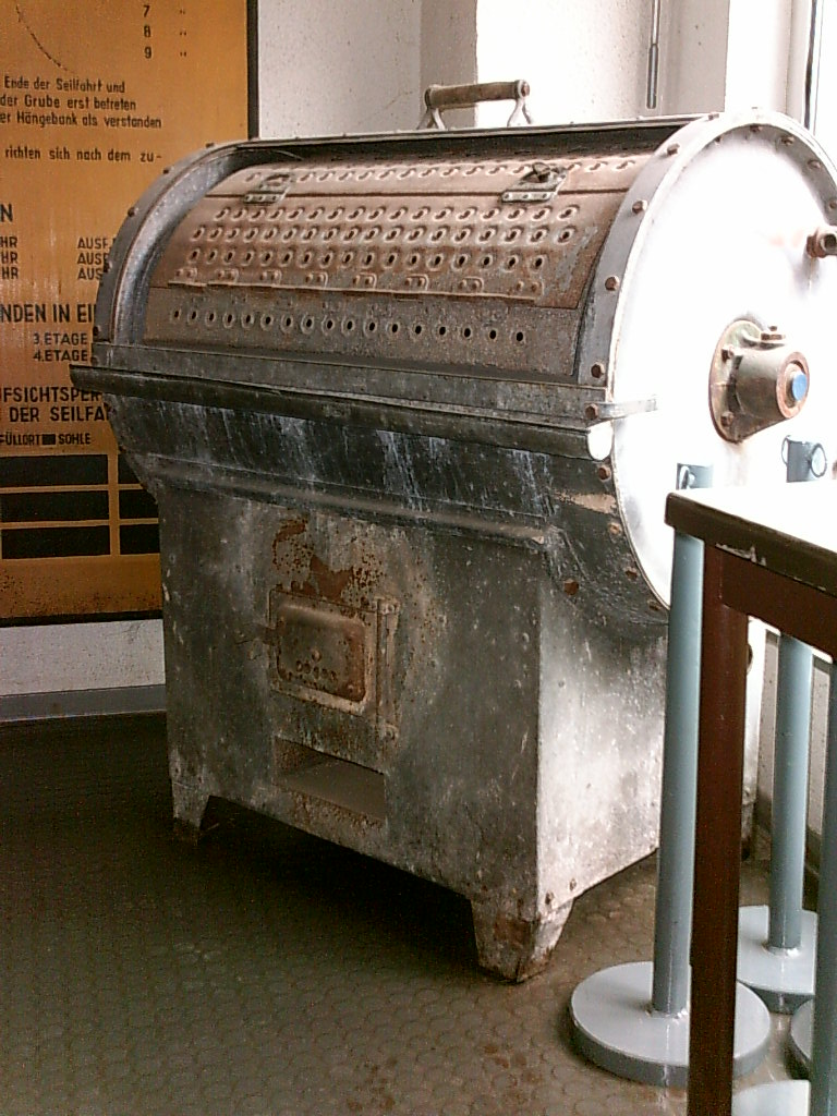 Waschmaschine für die Arbeitskleidung von Bergmännern.